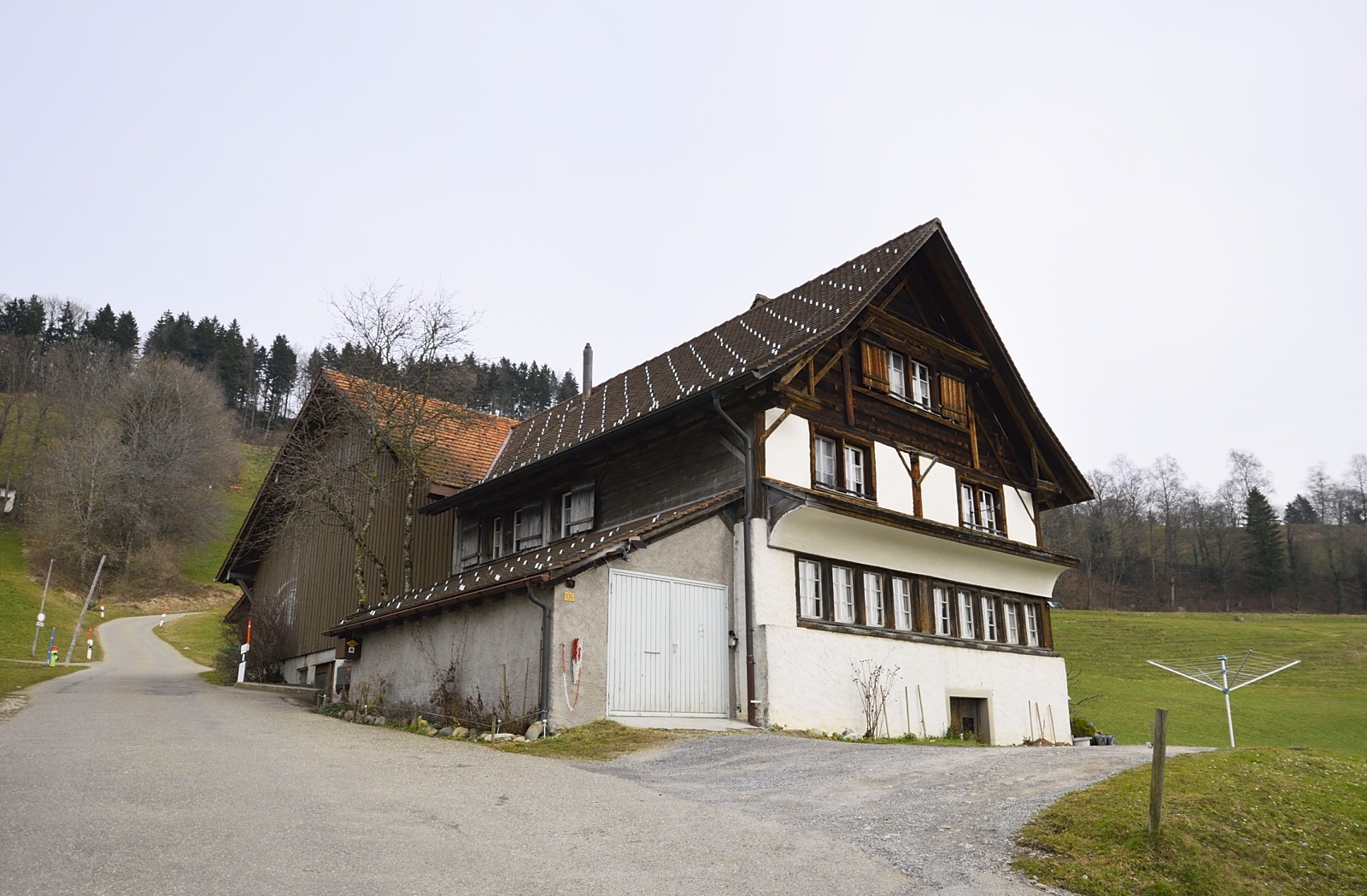 Ehemaliger Bauernhof mit Scheune, ID 11700207